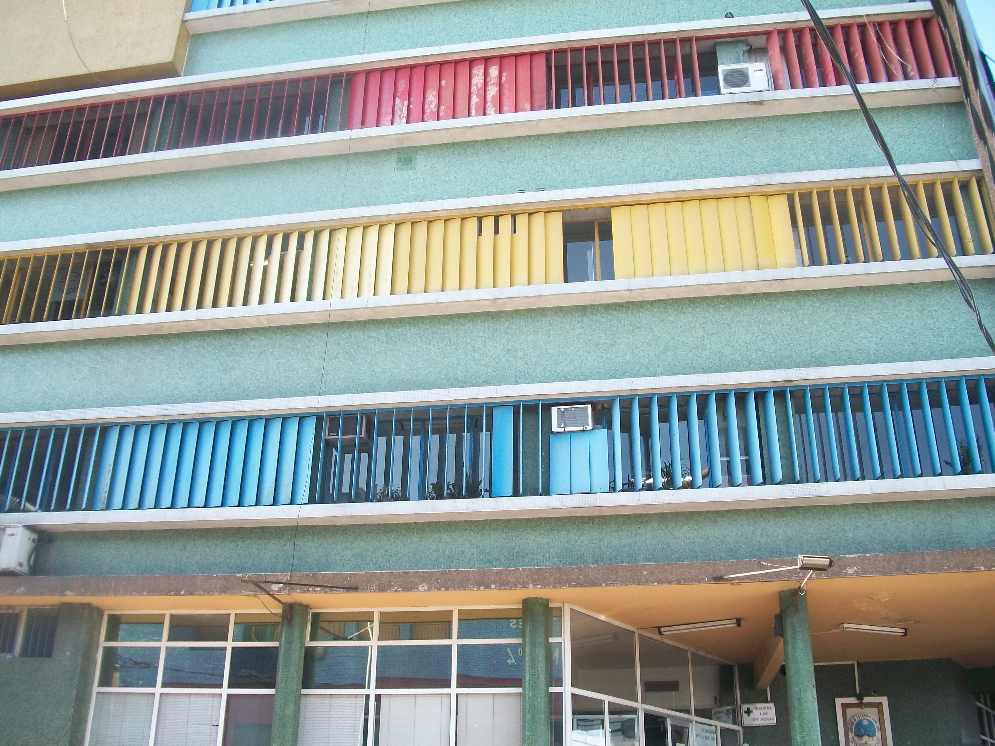 Hospital Municipal de Odontología, La Boca, Buenos Aires